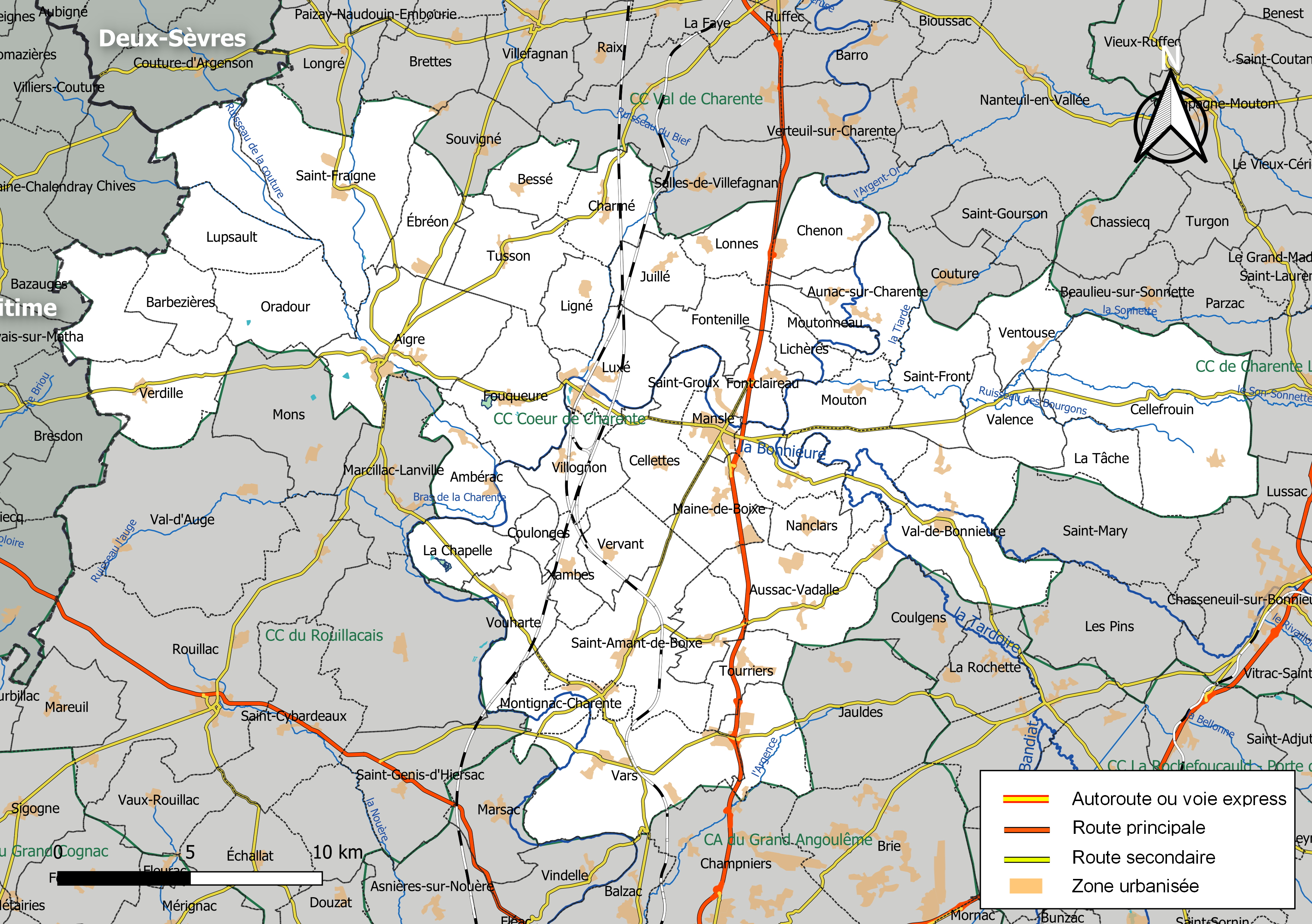 Carte géographique de la Communauté de communes Cœur de Charente, département de la Charente, France. Composition au 1er janvier 2019.